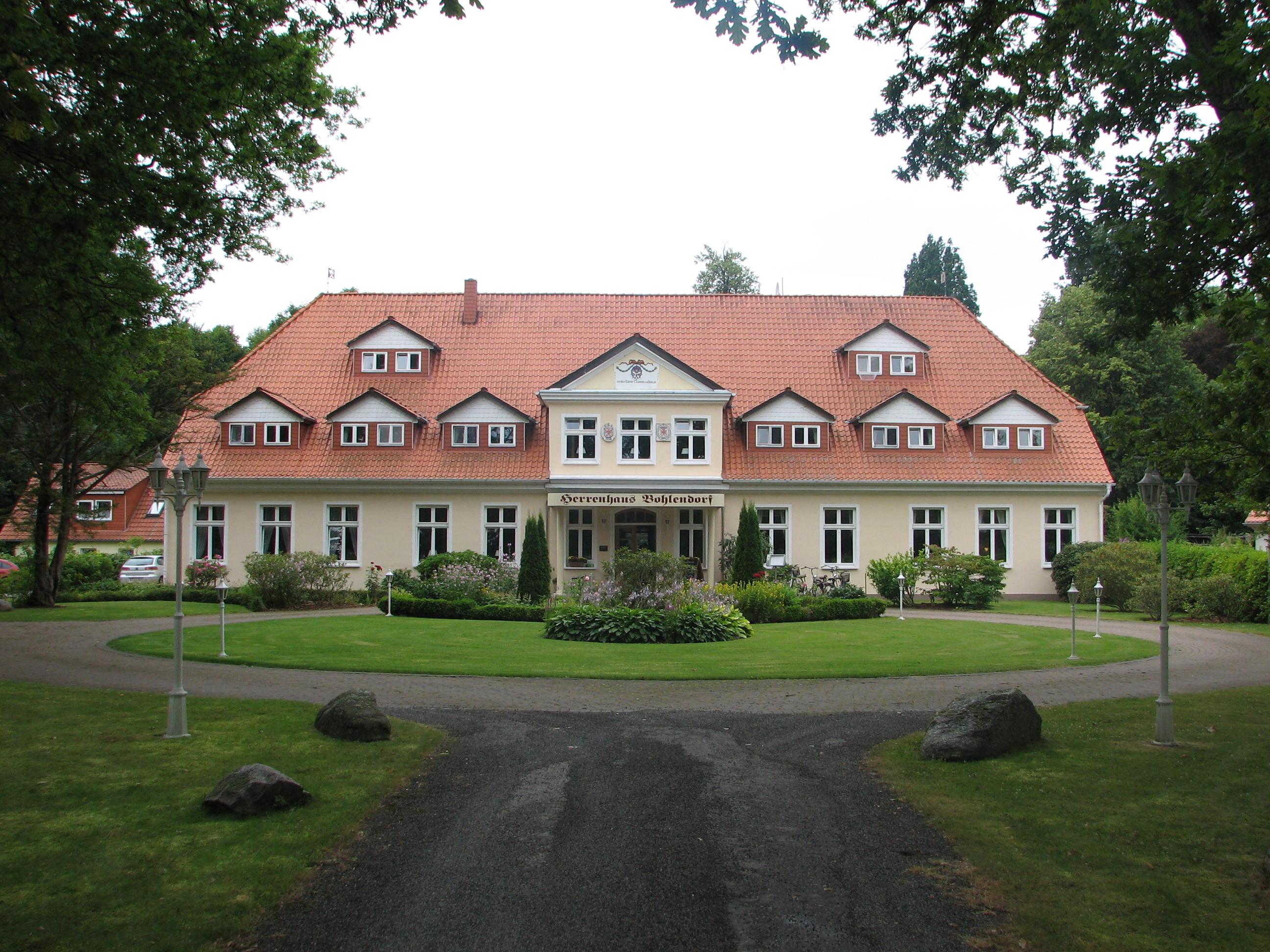 denkmalgeschütztes Gutshaus